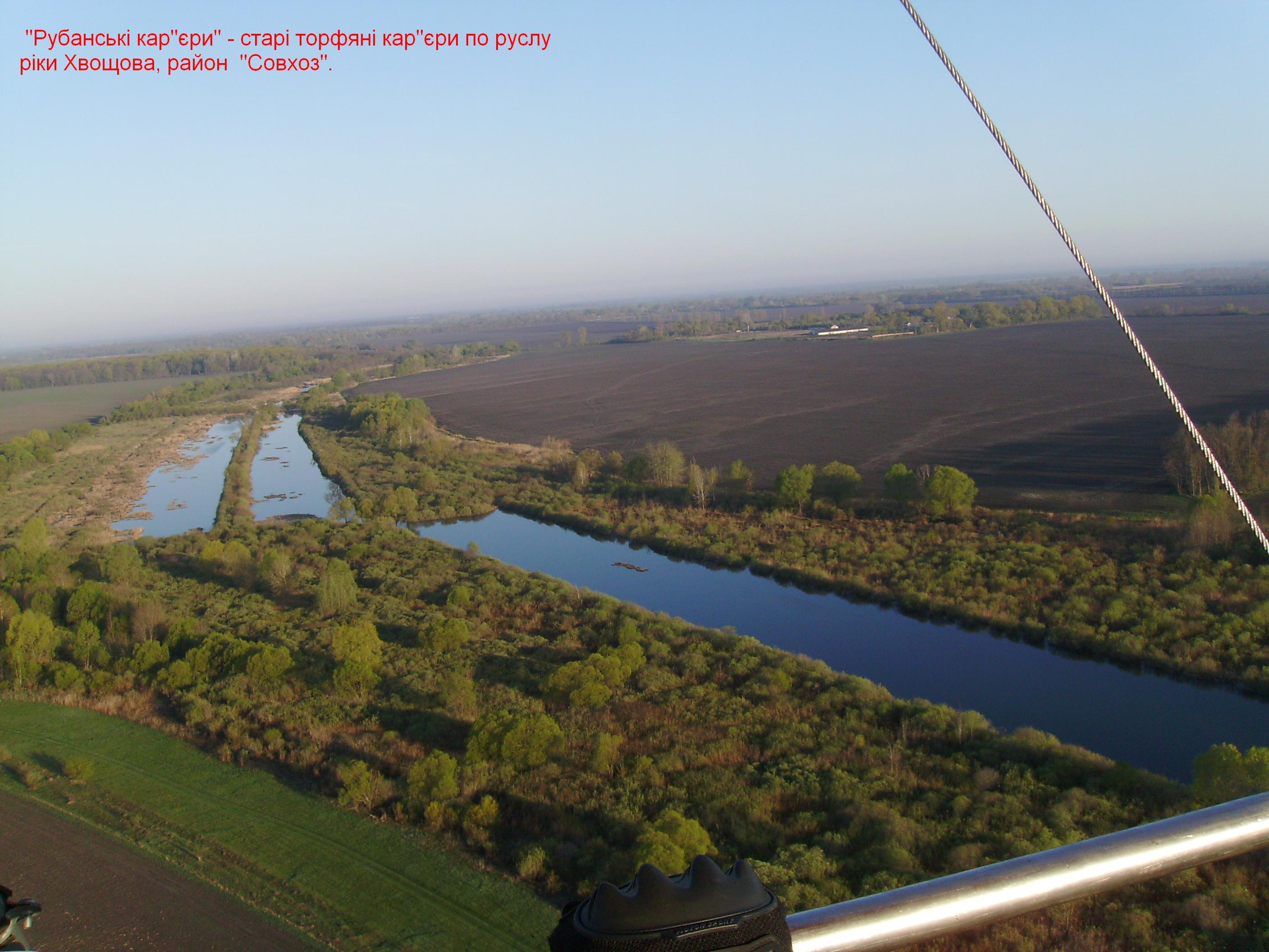 "Рубанські кар"єри" - торфорозробки на річці Хвощова